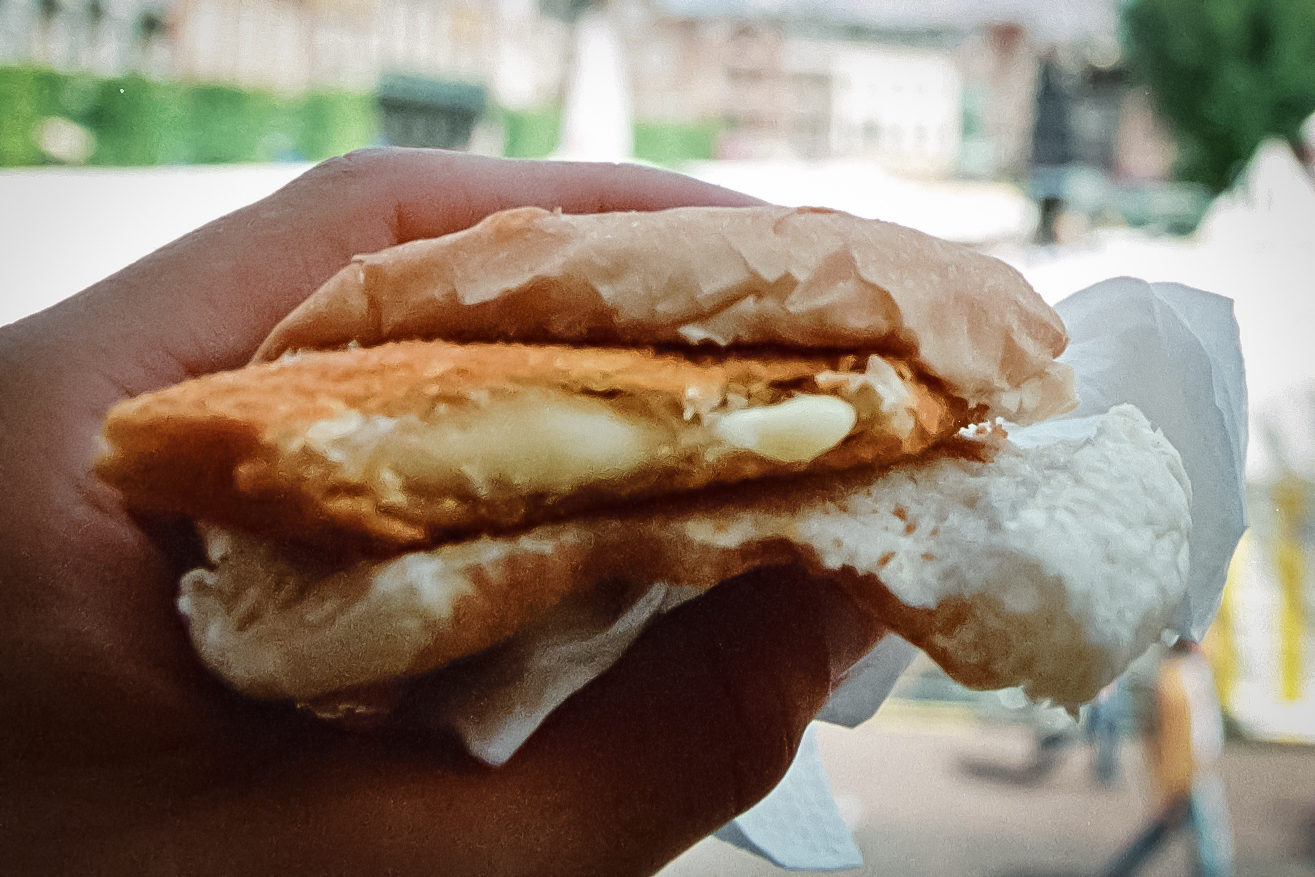 Broodje kaassoufflé / Dutch cheese-soufflé sandwich